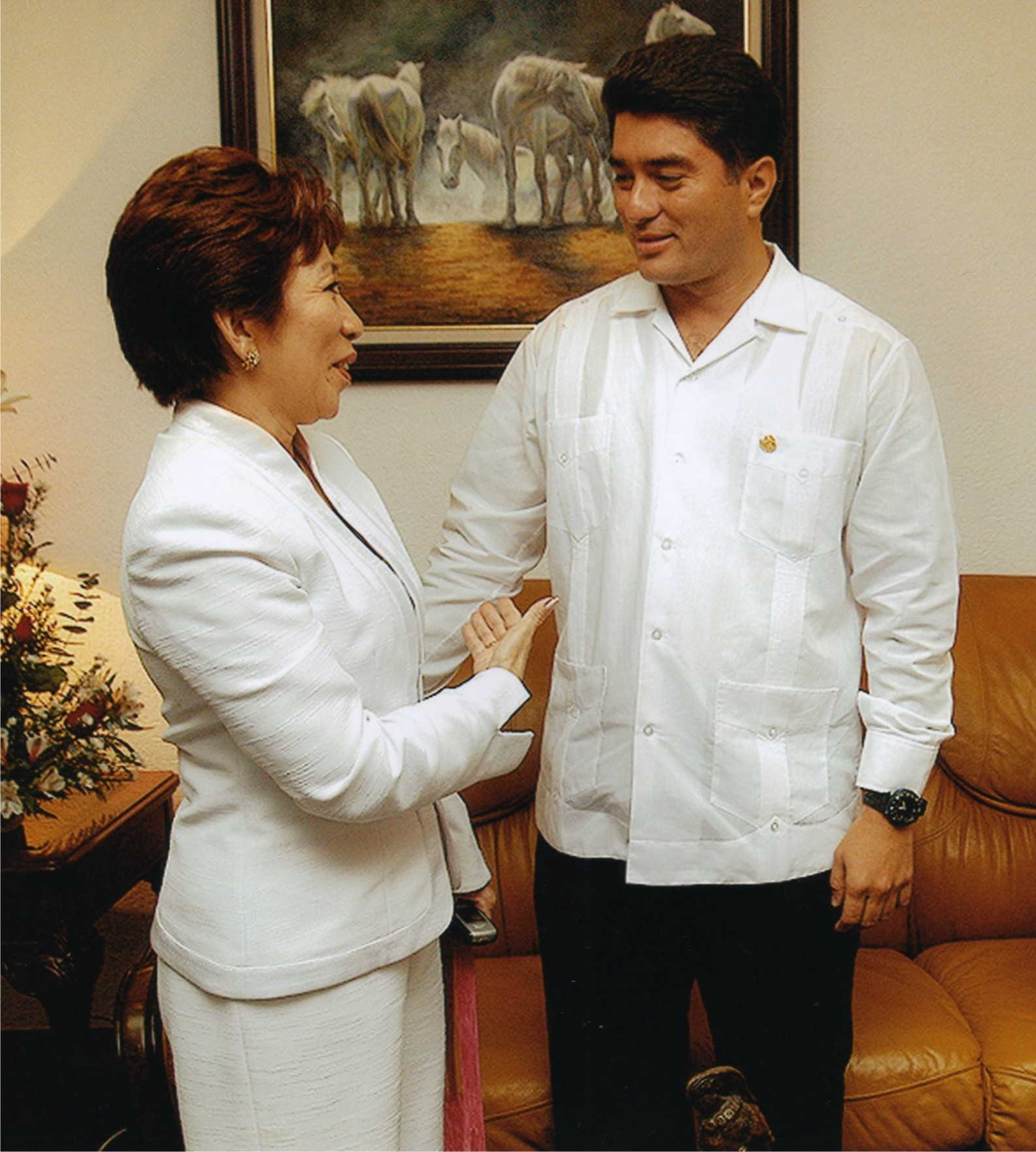 en la foto, Lizbeth Song con Felix Gonzalez en una sala de juntas del Palacio de Gobierno.